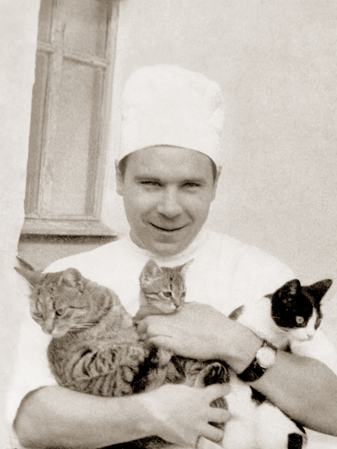 Профессор Юрий Александрович Гуркин в годы работы ассистентом кафедры фармакологии ЛПМИ